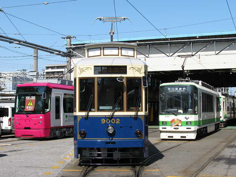 都電荒川線の新世代を担う8800形と9000形、8500形の3形式。